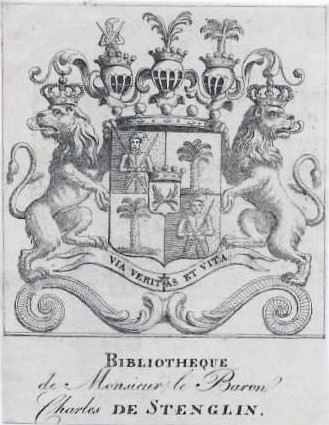 Baronswappen der alten, ursprünglich aus Schwaben stammenden Patrizierfamilie Stenglin (konkret für Karl Freiherr von Stenglin [Charles Baron de Stenglin])